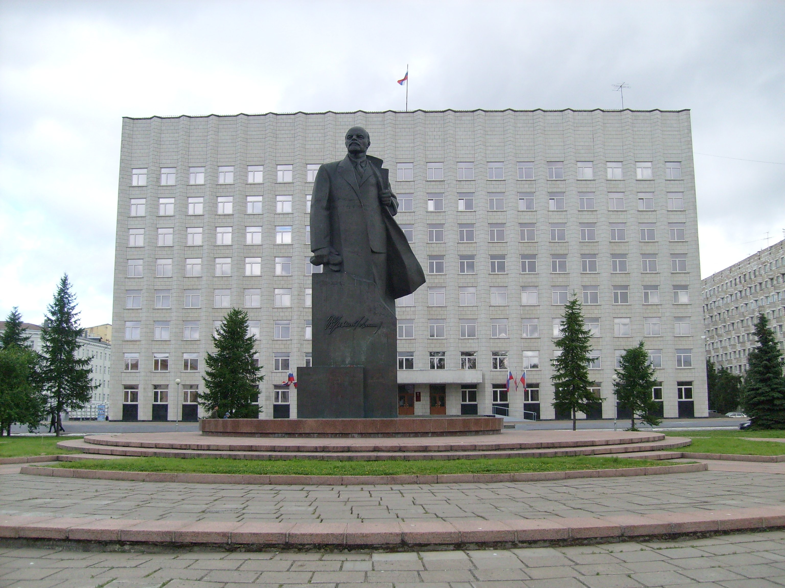 Здание Архангельского областного Совета депутатов и памятник Ленину, площадь Ленина, Архангельск